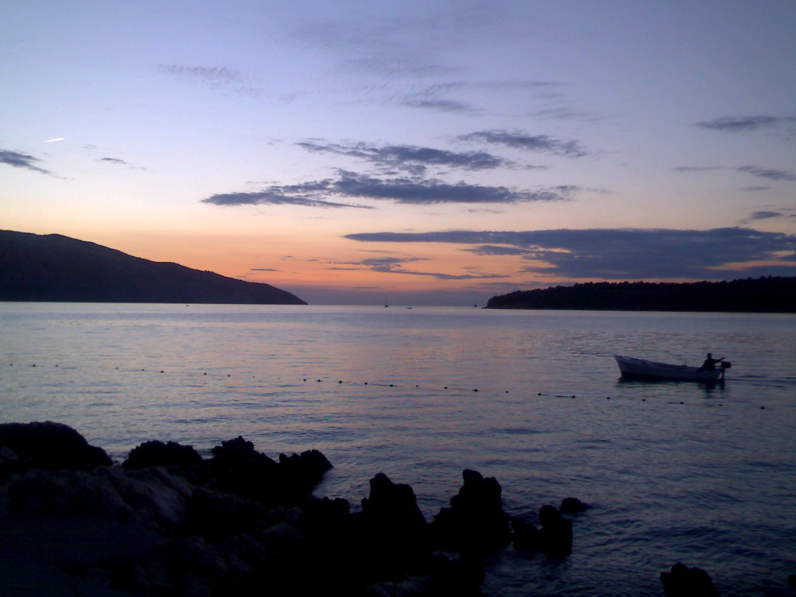 Starigrad in Hvar island